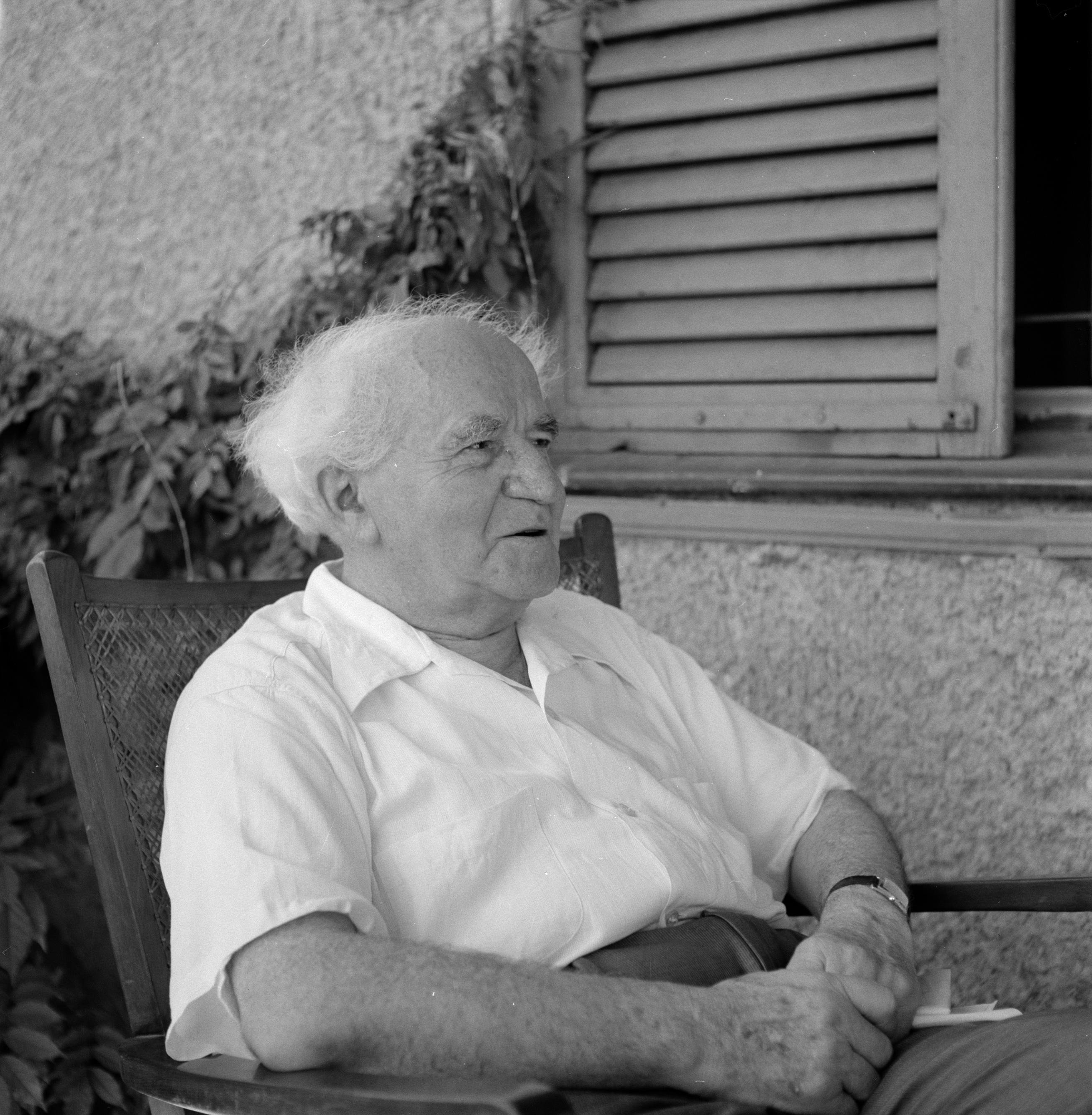 Collectie / Archief : Fotocollectie Van de Poll Reportage / Serie : [ onbekend ] Beschrijving : David Ben-Gurion tijdens de opname van een gefilmd interview door de National Broadcast Corporation Datum : 1 januari 1964 Locatie : Israël Trefwoorden : interviews, politici, portretten Persoonsnaam : Ben Goerion, David Fotograaf : Poll, Willem van de Auteursrechthebbende : Nationaal Archief Materiaalsoort : Negatief (zwart/wit) Nummer archiefinventaris : bekijk toegang 2.24.14.02 Bestanddeelnummer : 255-4218